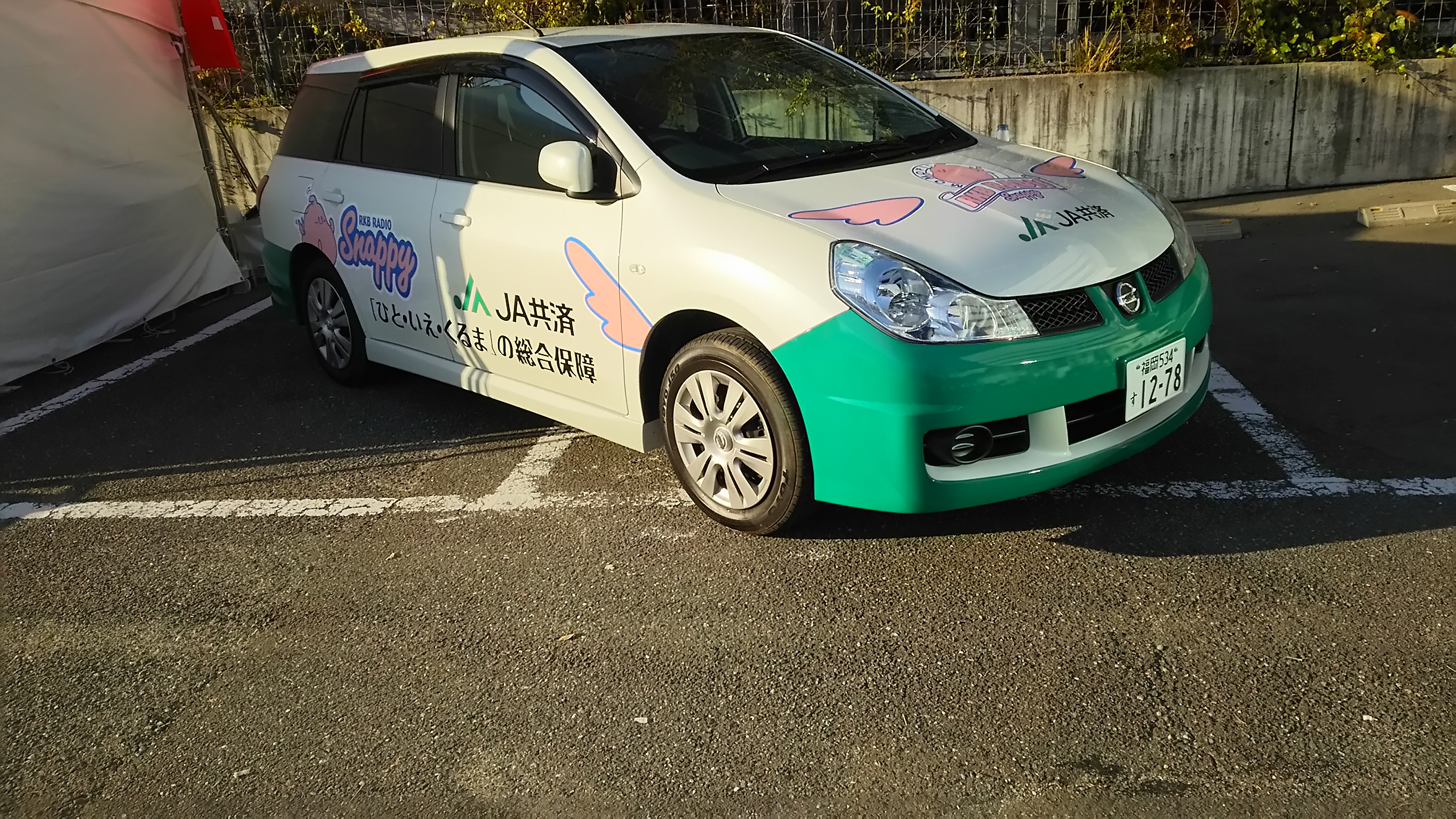 2015年10月17日のRKBラジオまつりにて撮影。